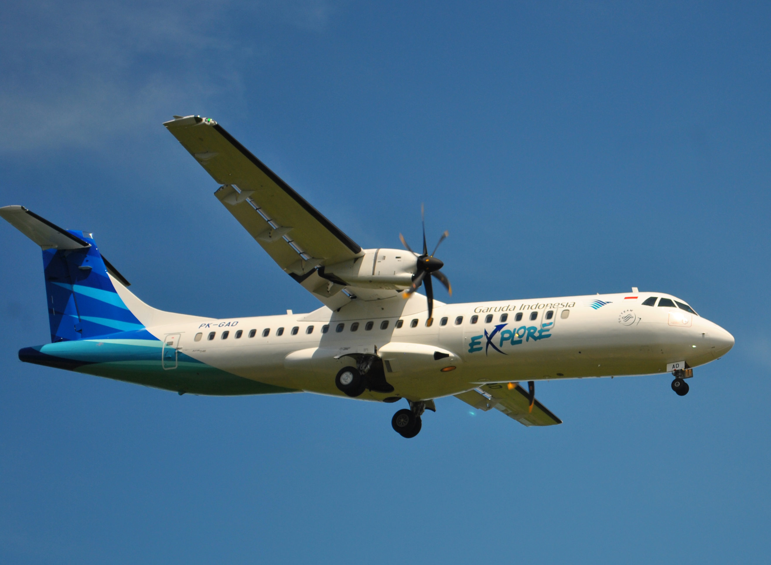 ATR 72-600 (PK-GAD, bekas kode registrasi pesawat Garuda Airbus A300) milik Garuda Indonesia sedang mendarat di Bandara Ngurah Rai, Tuban, Kab. Badung, Bali.